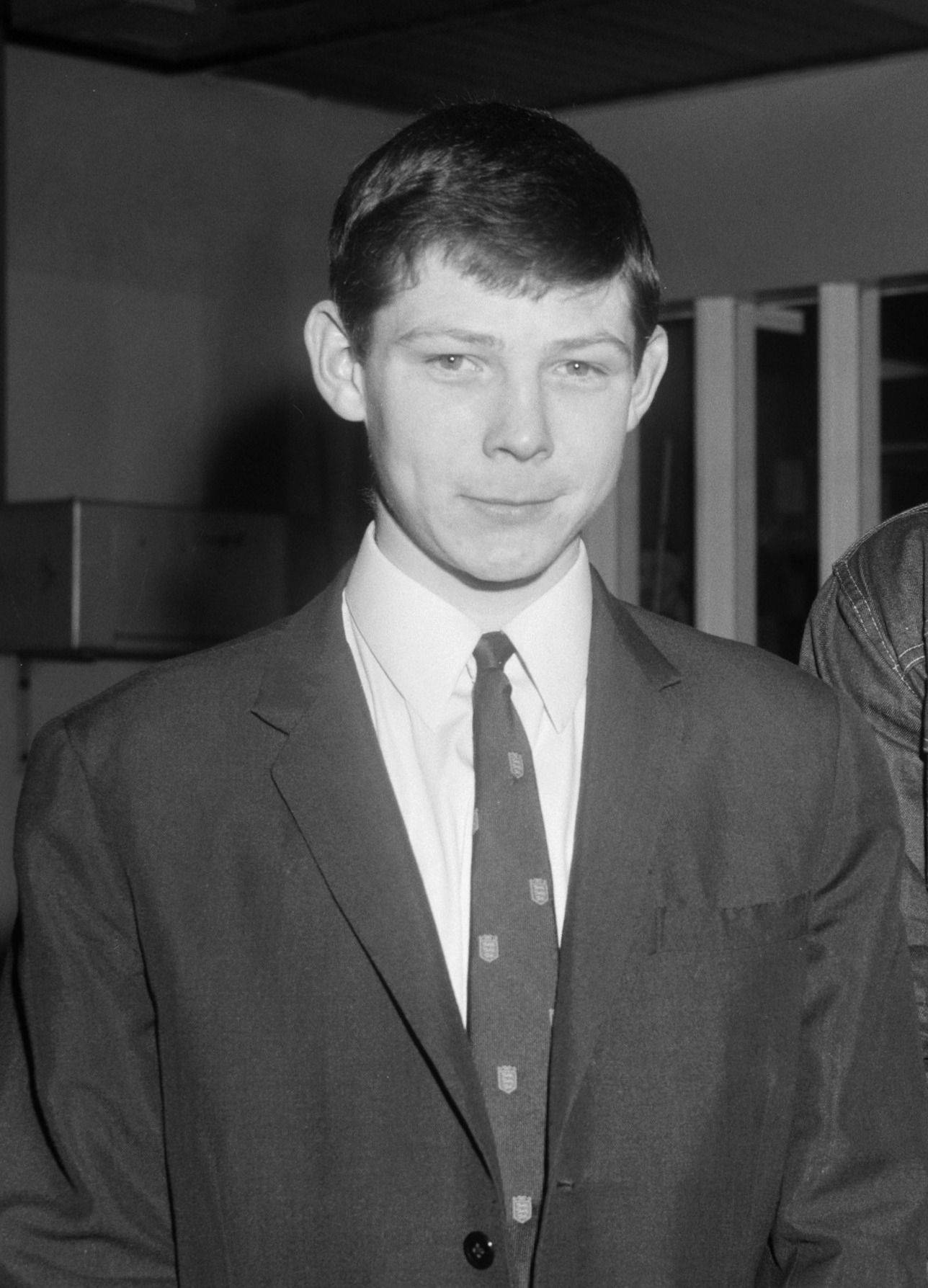 Aankomst boksploegen op Schiphol, ploeg uit Engeland, Mougthon